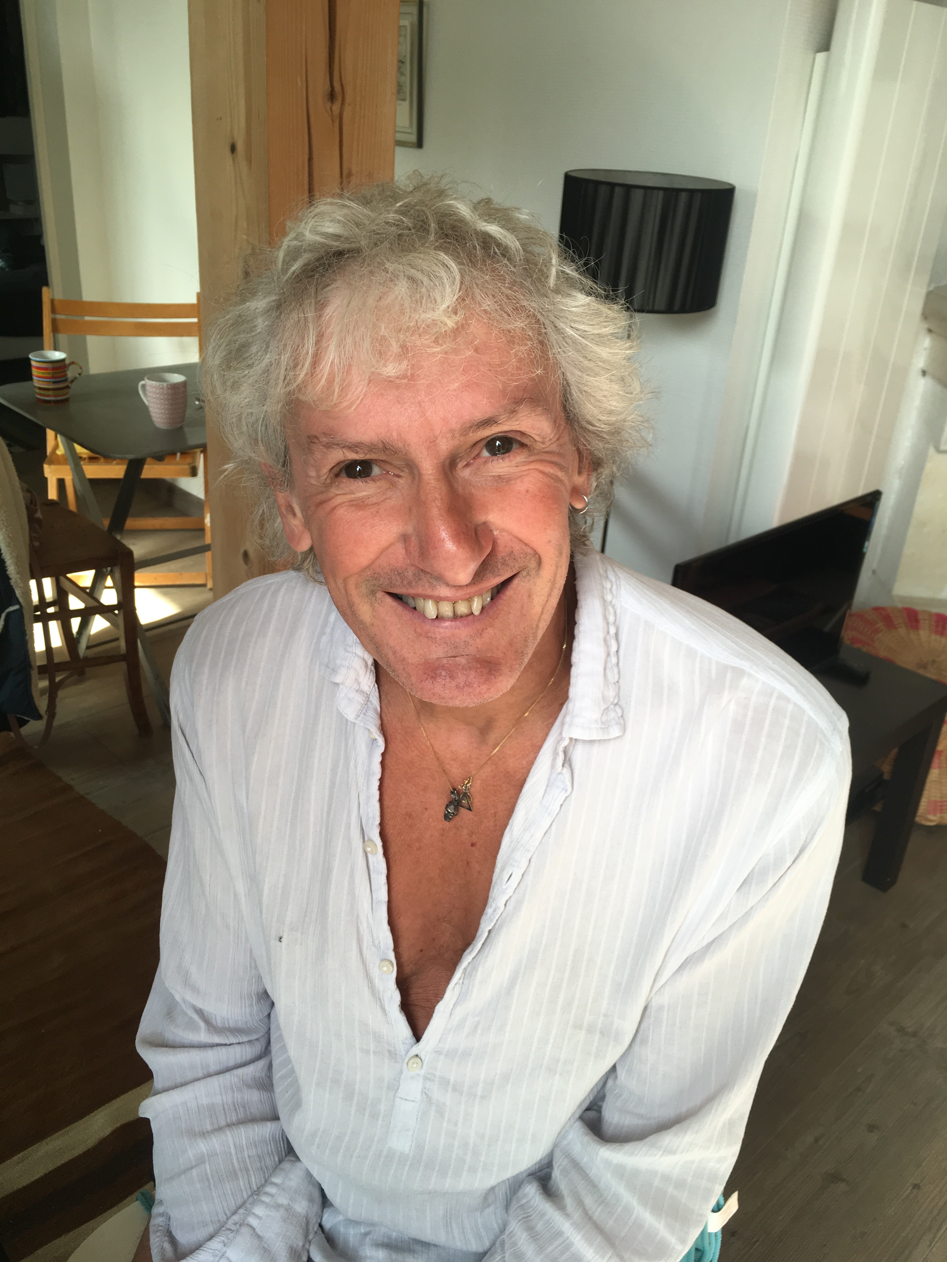 Franck Balandier, chez lui. Nouvelle Aquitaine. 2019.